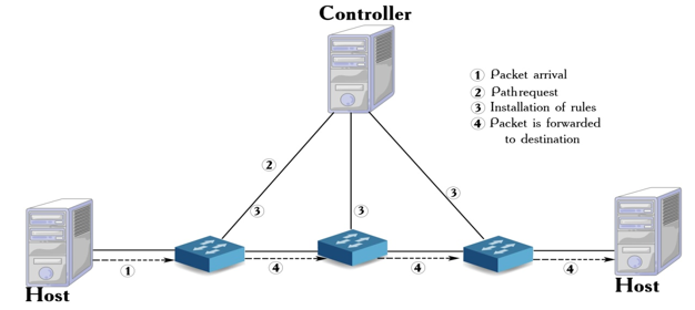 Монгол: Reactive